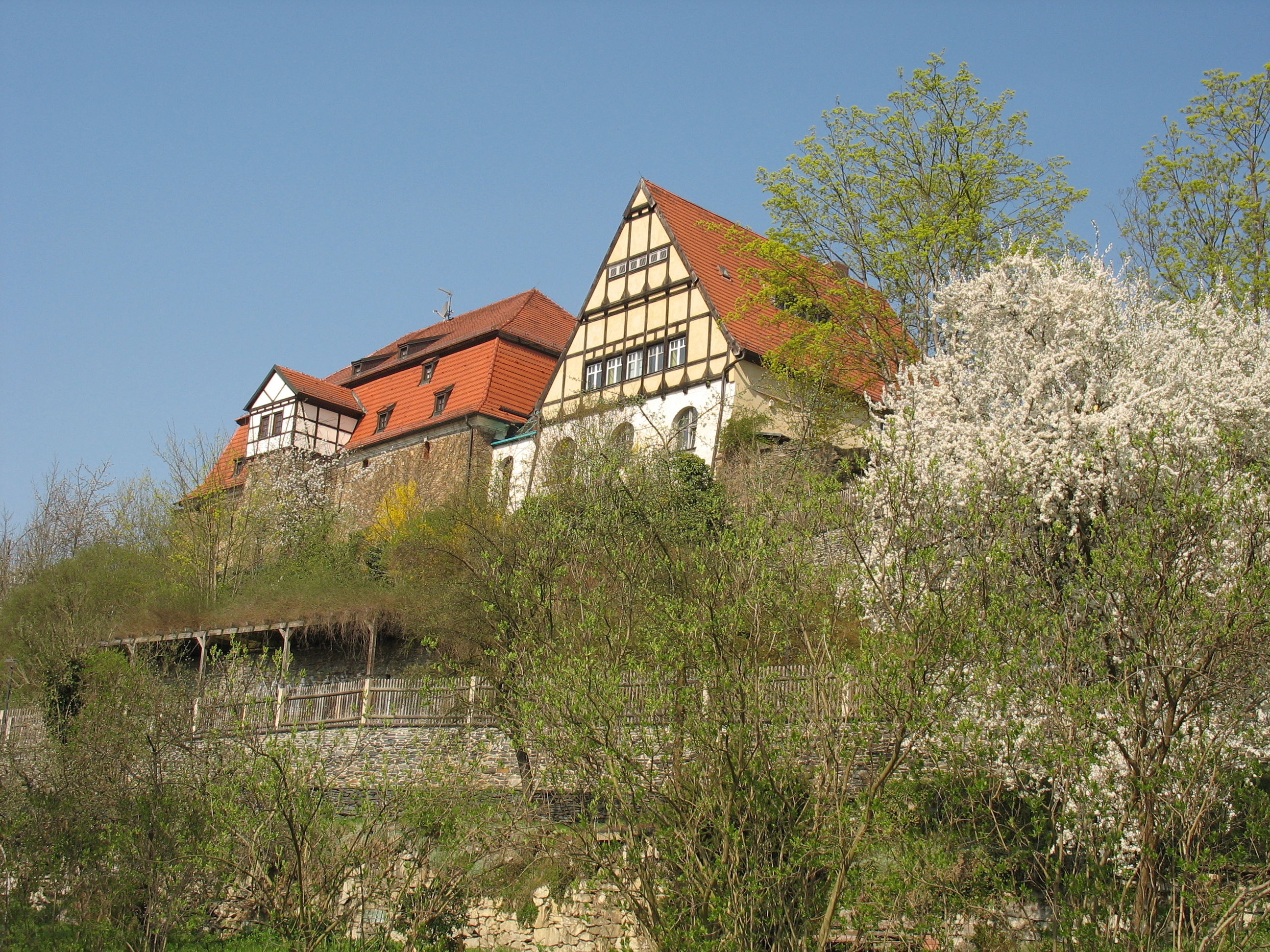 Das Malzhaus (ehem. Everstein'sches Schloss) in Plauen von der Bleichstraße aus gesehen